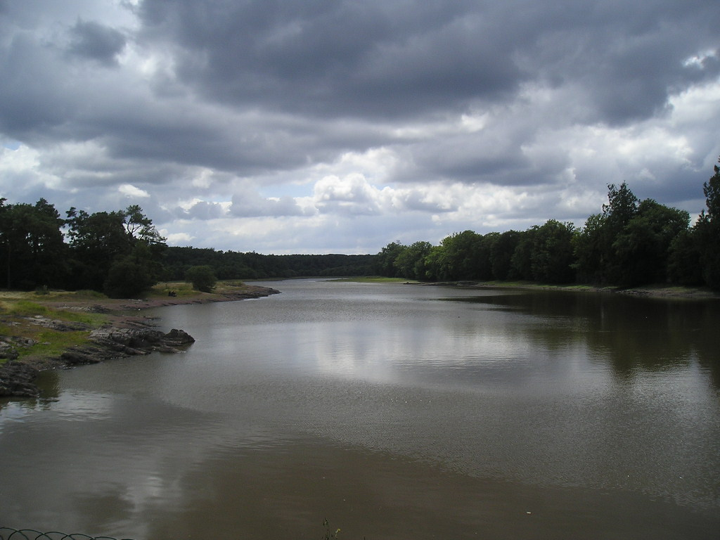 Etang de Comper, Chateau de Comper (Concoret). La légende veut que sous cet étang se cache le palais de la fée Viviane.